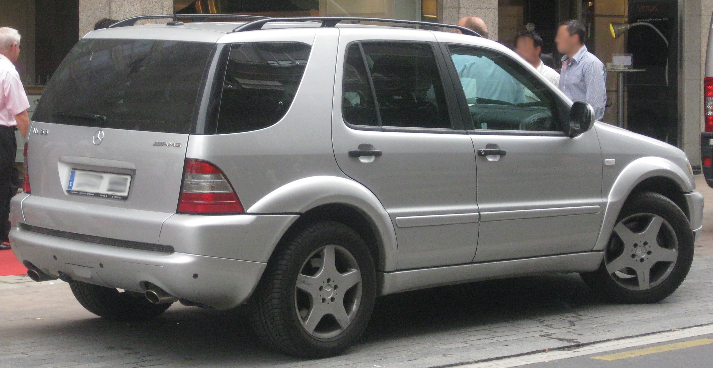 2001 Mercedes-Benz ML 55 AMG [W163]